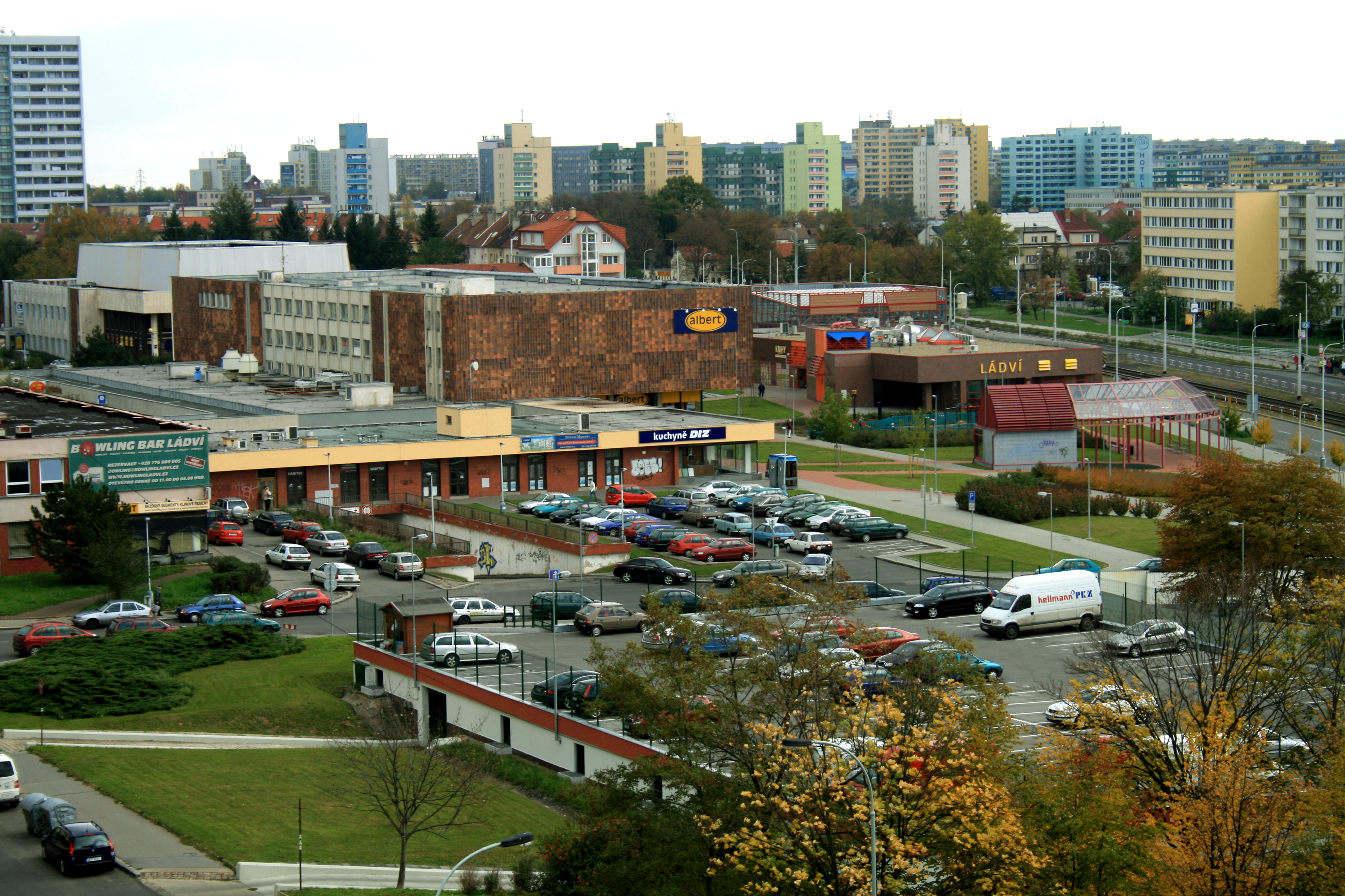 Prague Metro station Ládví with part of Prage 8 - Kobylisy Stanice metra Ládví v pražských Kobylisích Date= October 2007 Author=Karelj